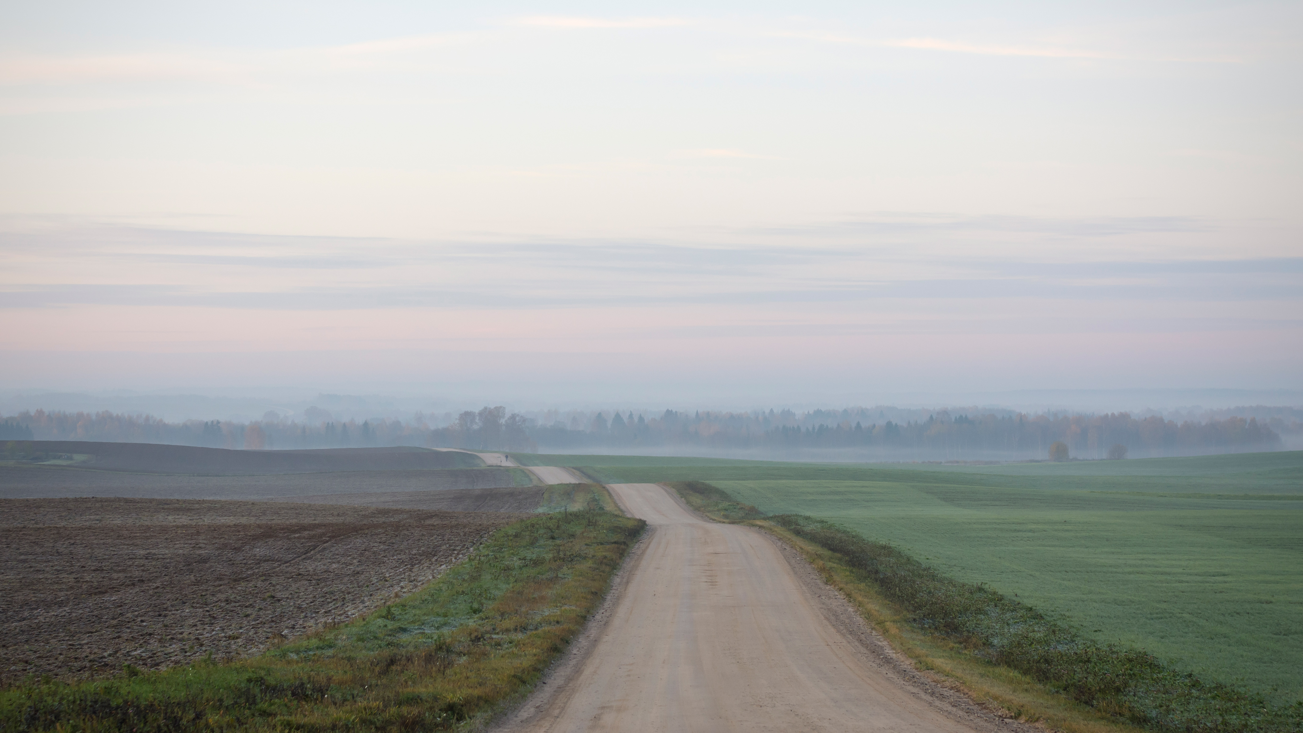 Vaade Kindralimäelt Tamsa-Eisaste teele. Tamsa küla, Tartu maakond. November 2011.